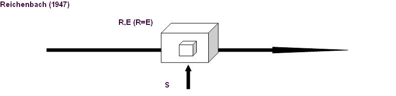 Tempussystem von Reichenbach, Zeitachse Gegenwärtigkeit S,R,E